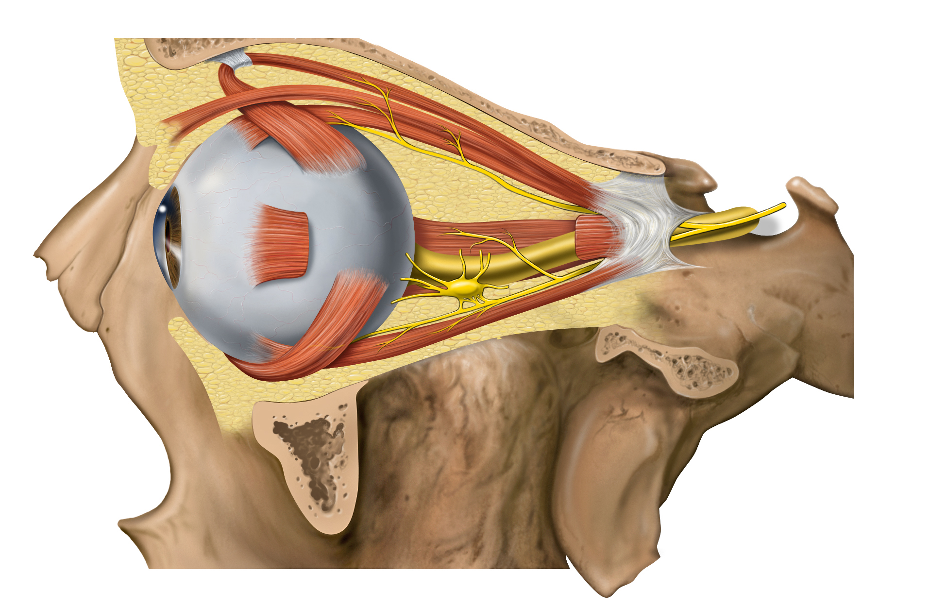 Lateral orbit anatomy